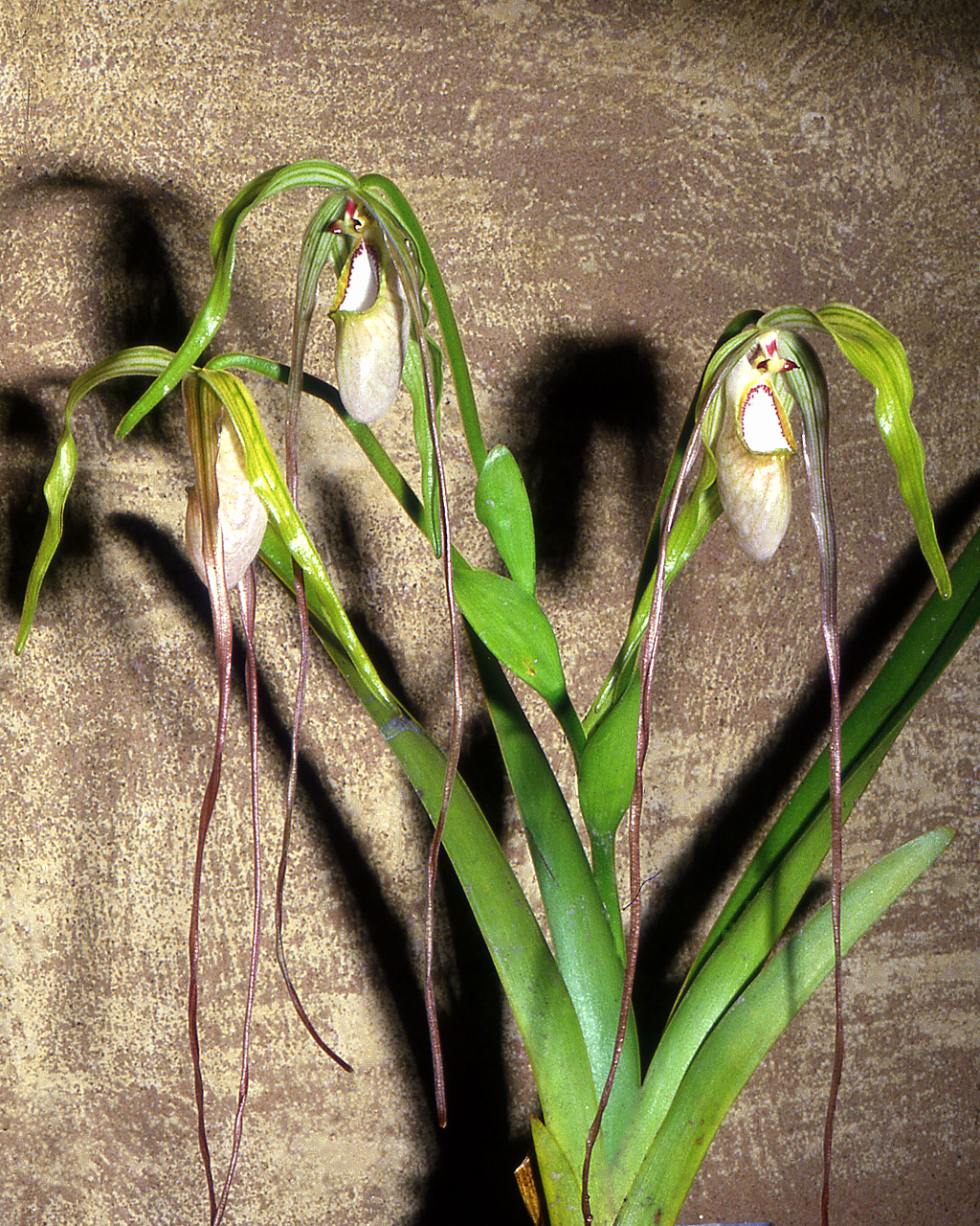 Phragmipedium warszewiczianum - flowers